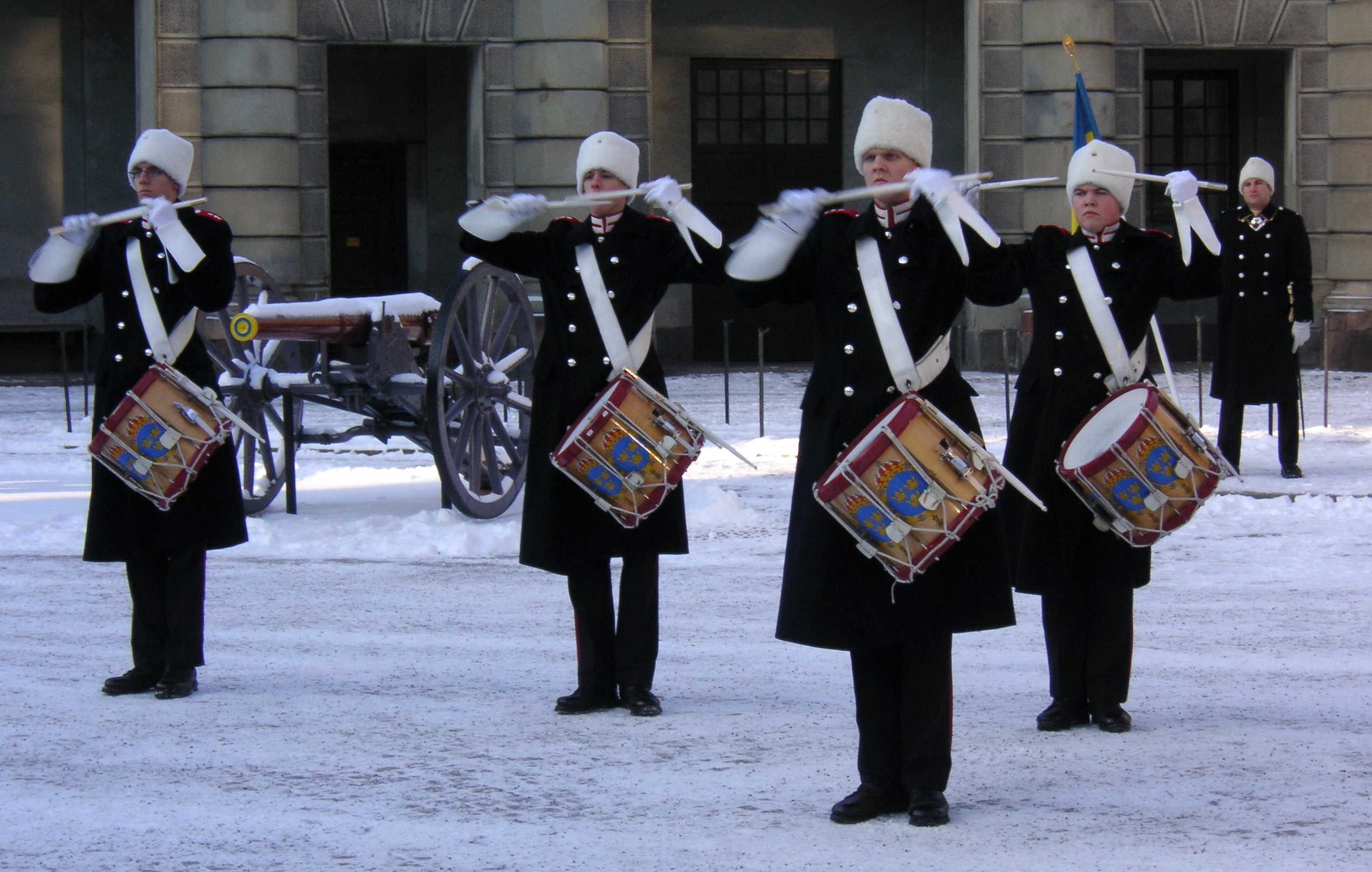 Vaktparaden på Stockholms slott